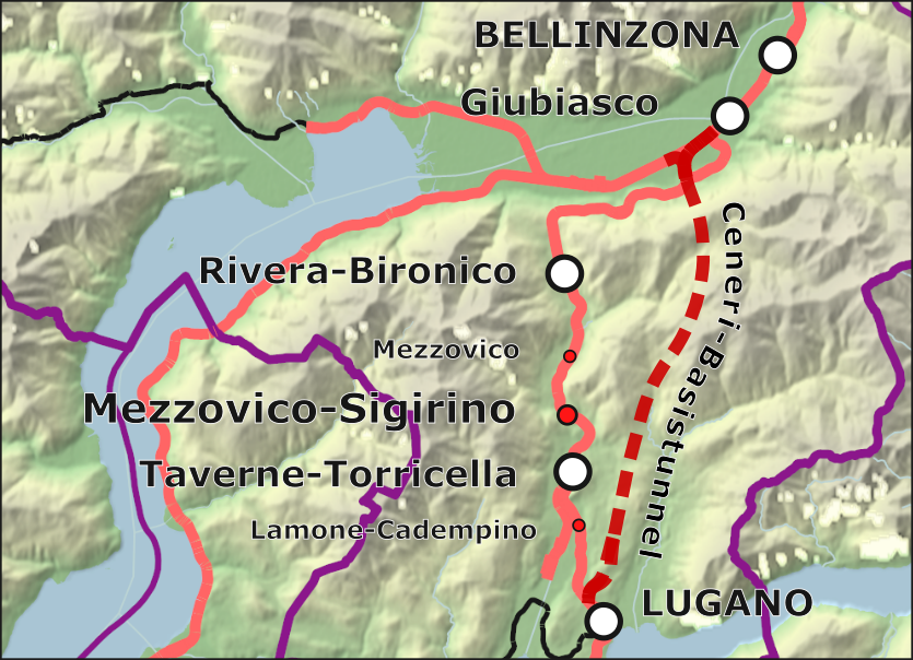 Karte des Ceneri-Basistunnels in der Schweiz.